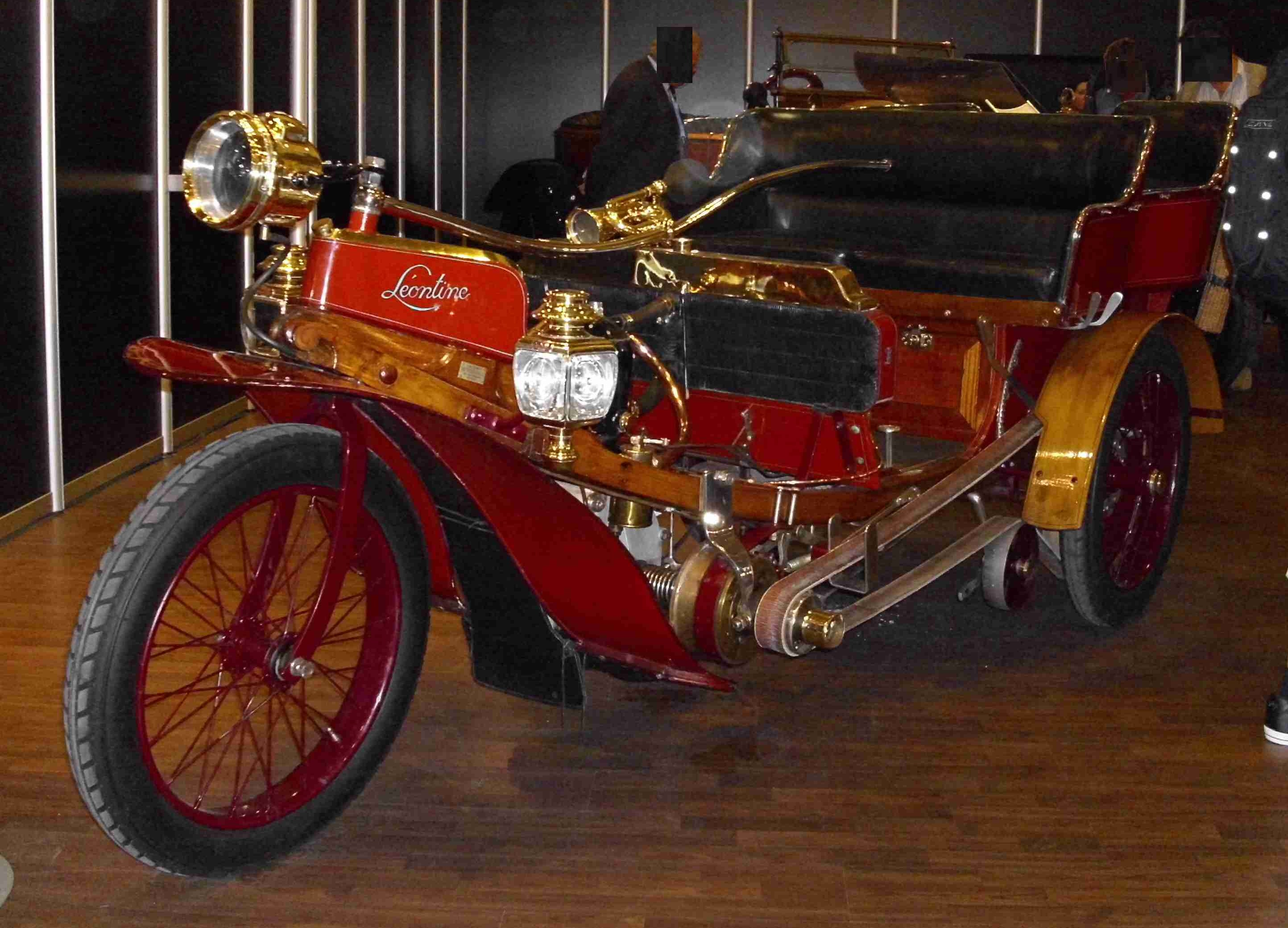 La Nef 1898